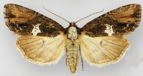 Bryolymnia semifascia female